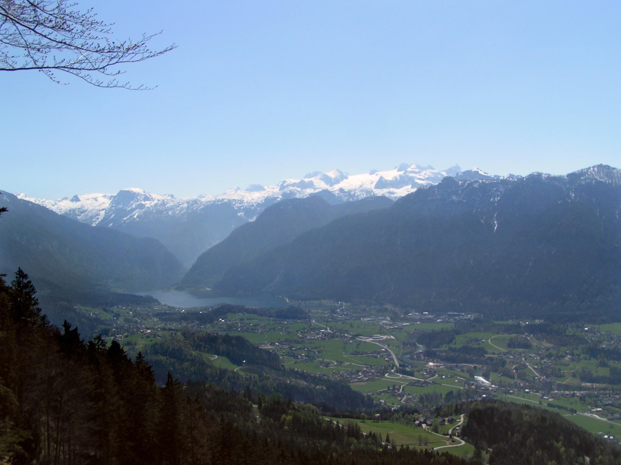 Goisererertal mit Hallstättersee und Dachstein von der Ewigen Wand (Blaschekwarte)